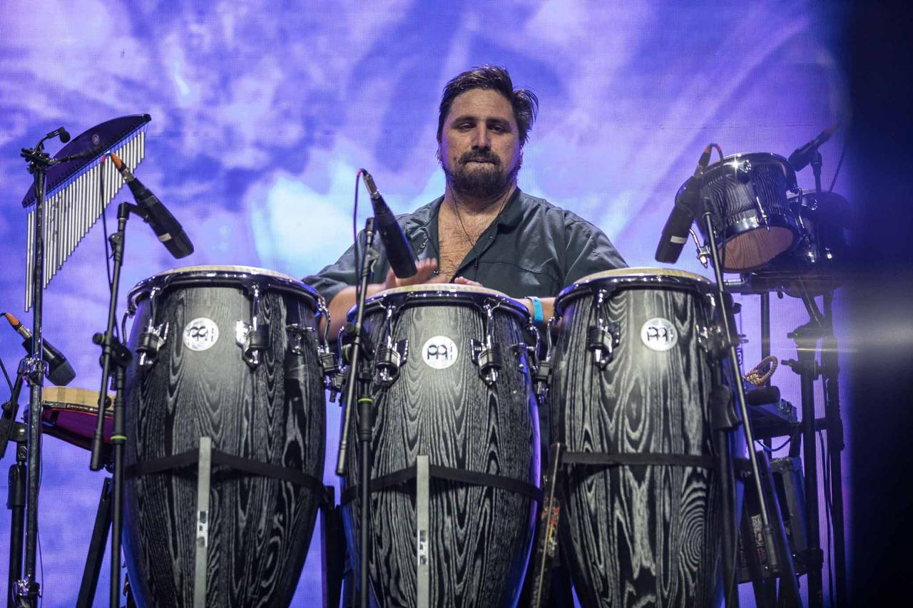 Foure tocando Congas